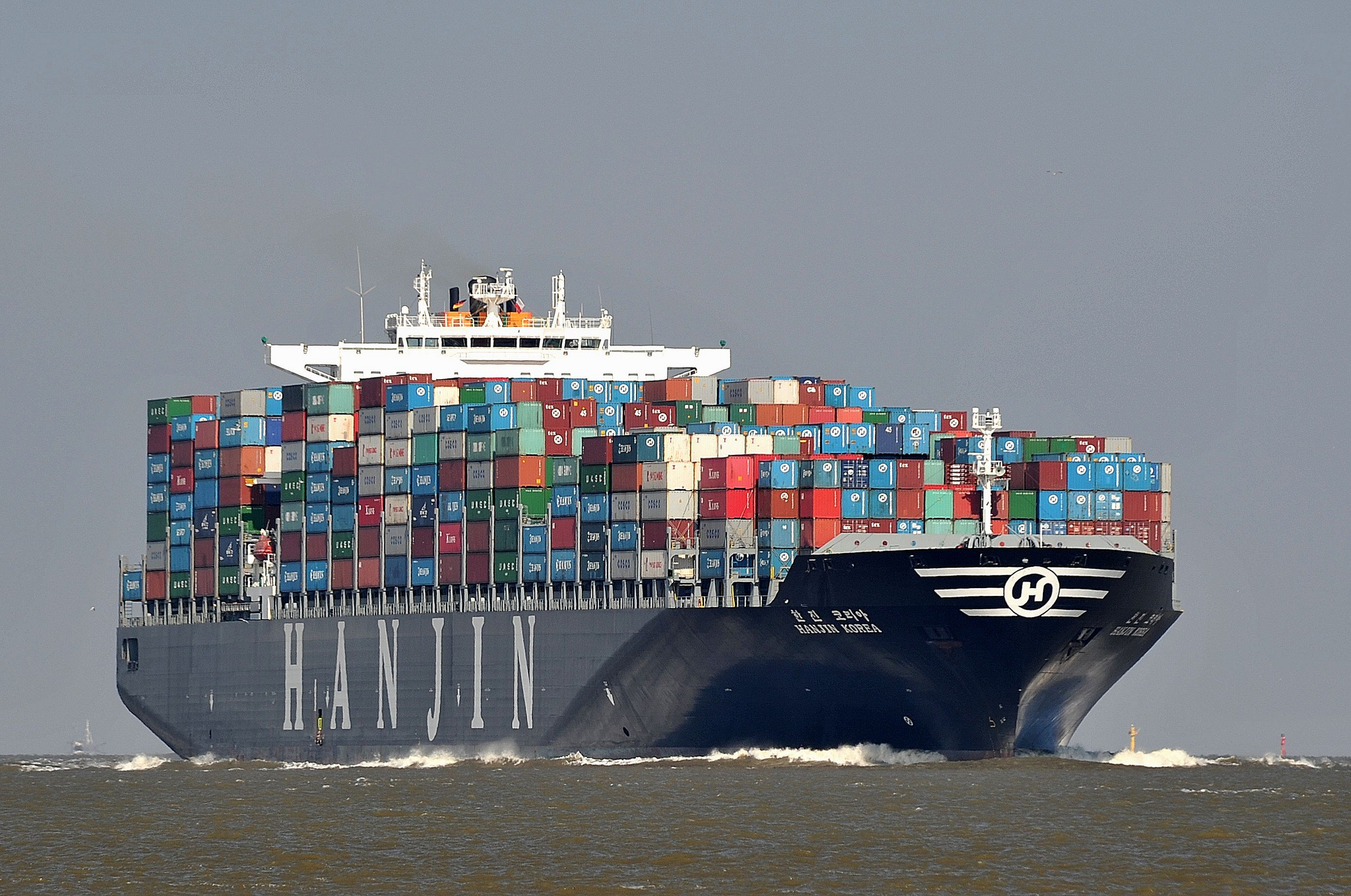 Die Hanjin Korea vor Cuxhaven